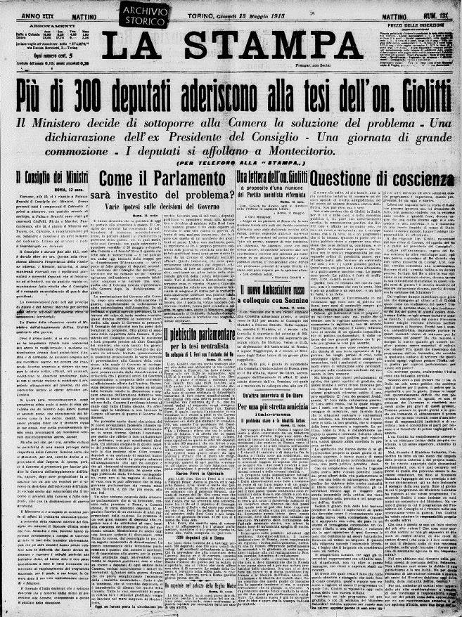 prima pagina della Stampa 13 maggio 1915